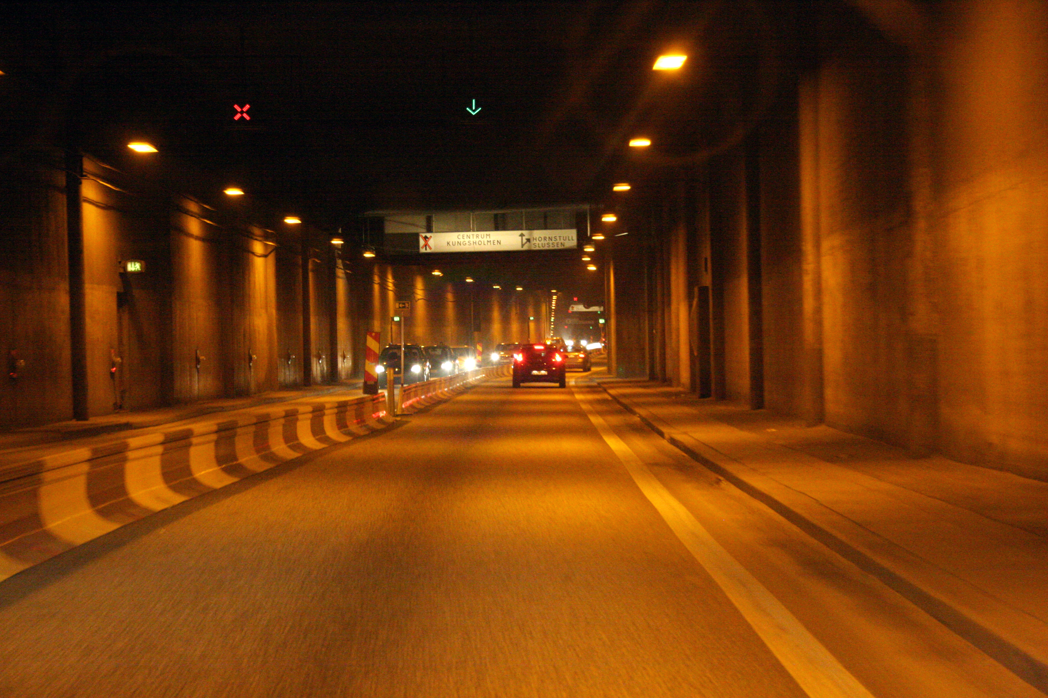 Söderledstunneln, Stockholm, Sweden, northbound during road works.